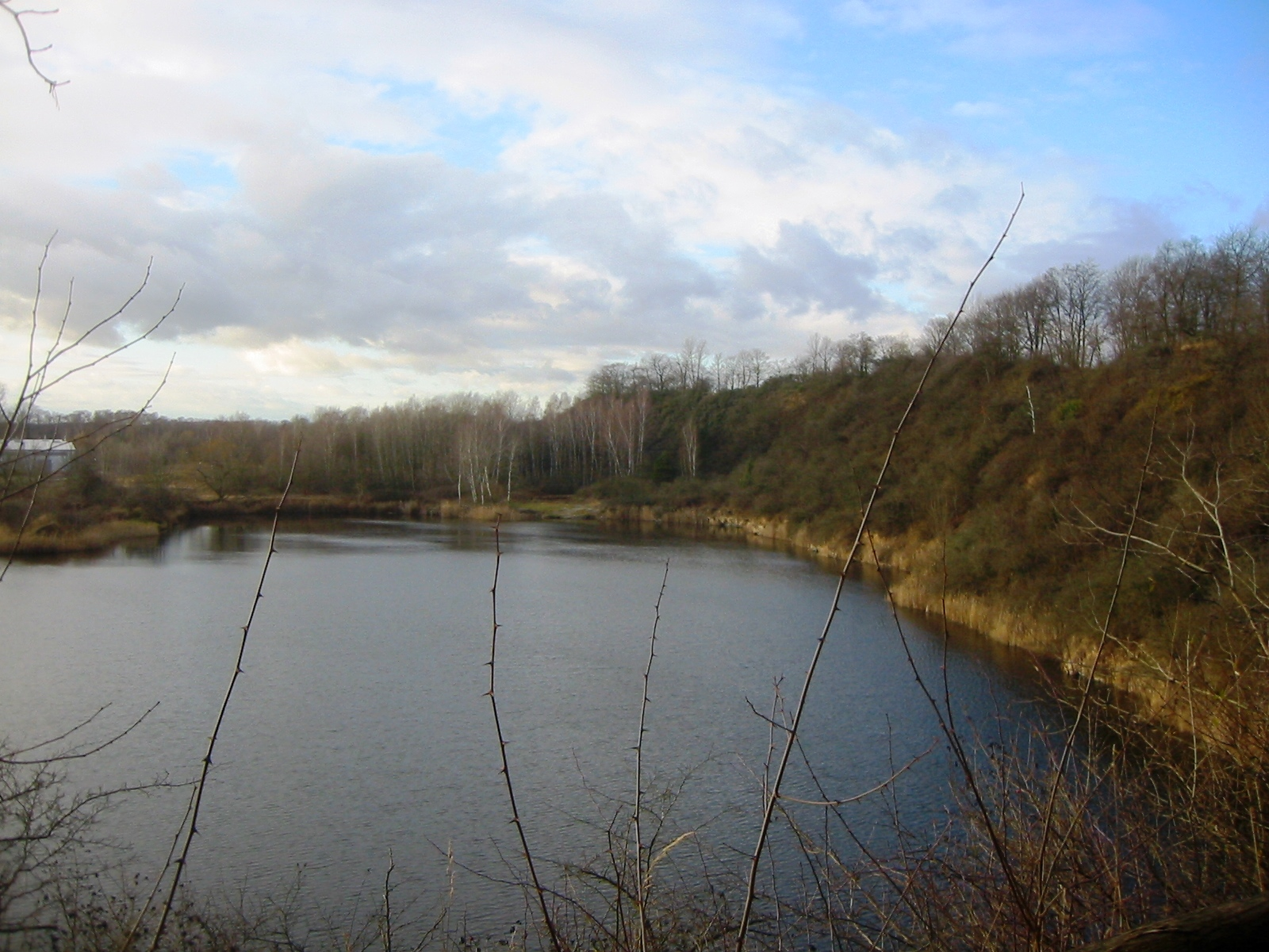 Restloch 3 im Naturschutzgebiet „Sperenberger Gipsbrüche“ in Sperenberg, ein Ortsteil der Gemeinde Am Mellensee, Teltow-Fläming, Brandenburg